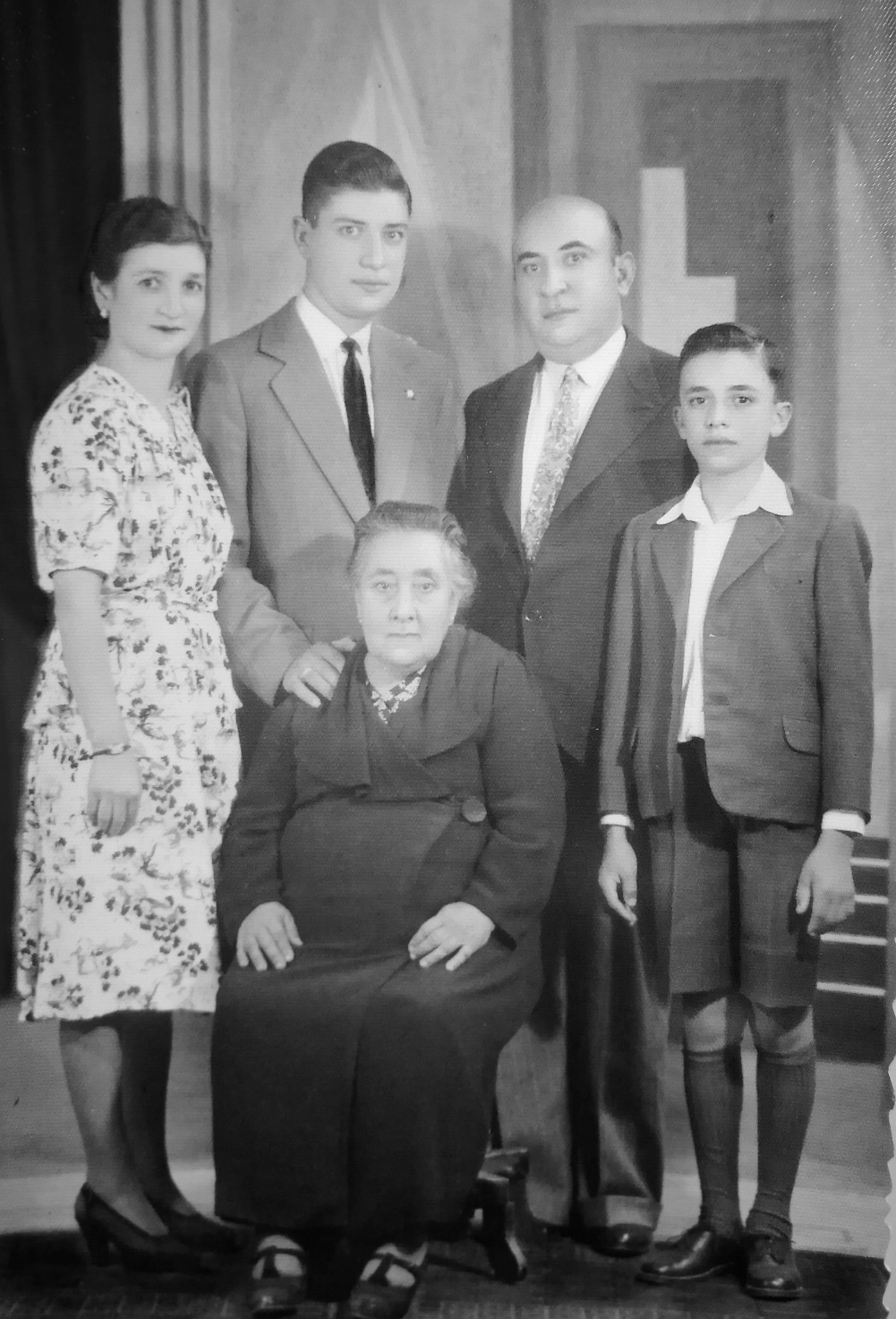 Retrato de la Familia Savelli, 1944. (de izquierda a derecha) Elena Politti Longhitano de Savelli, Jacinto Savelli, Palma Felicia Tozzo, Carmelo Savelli, Luis Victorino Savelli